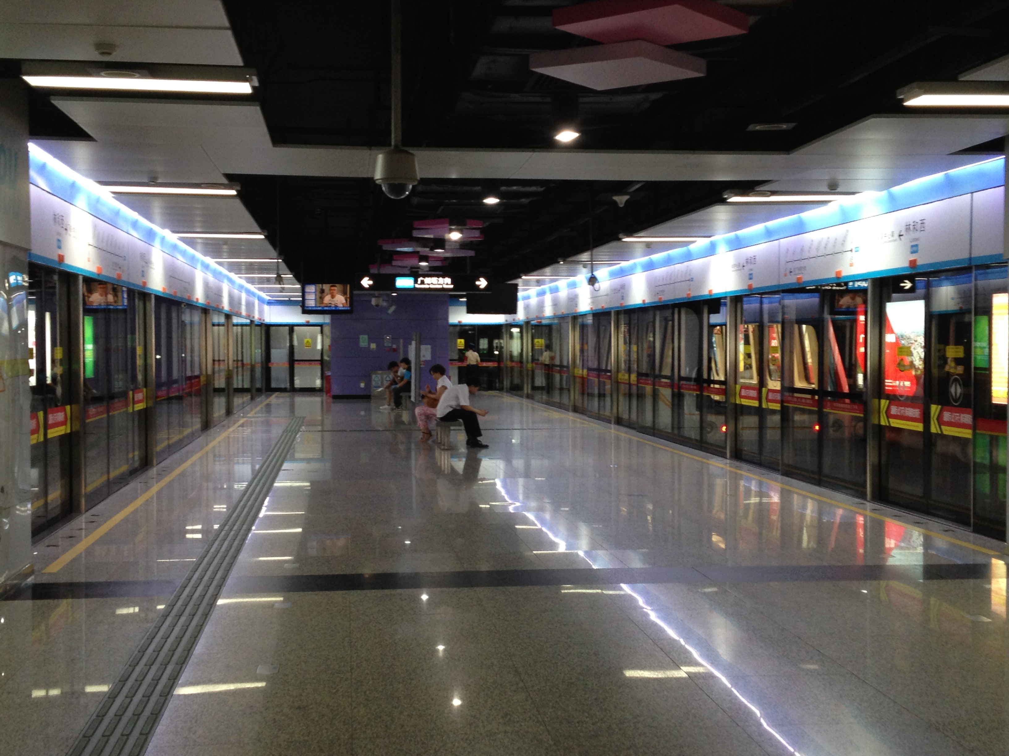 广州地铁APM线林和西站月台